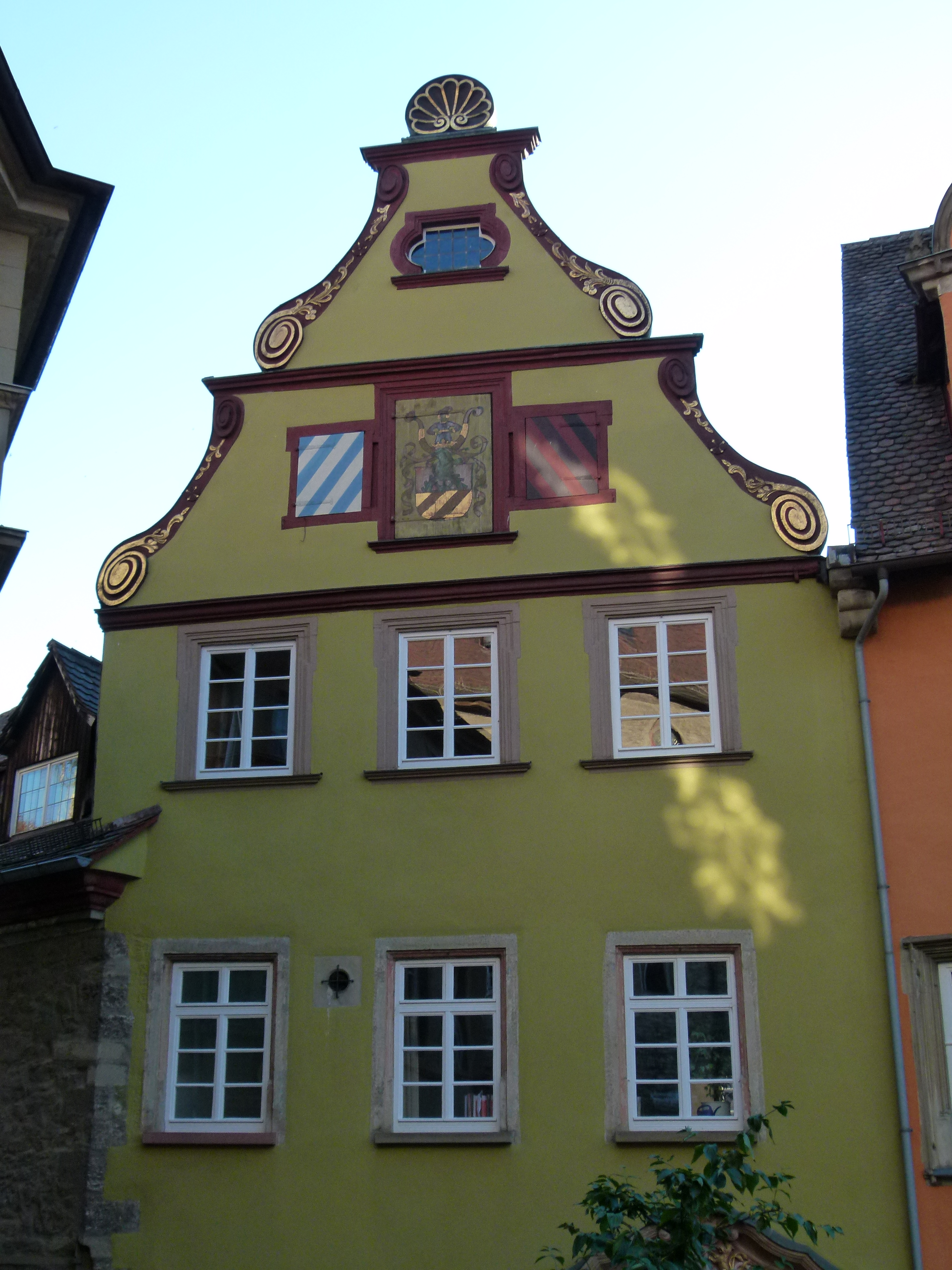 Denkmalgeschütztes Haus, Am Markt 4, Schwäbisch Hall